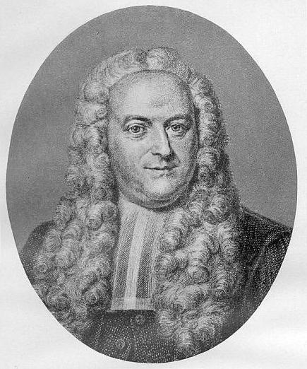 Pieter Burman der Jüngere (1714–1778). Stich von J. Houbraken, 1759, nach einem Gemälde von J. M. Quinkhard (aus dem Besitz von Otto Rossbach).